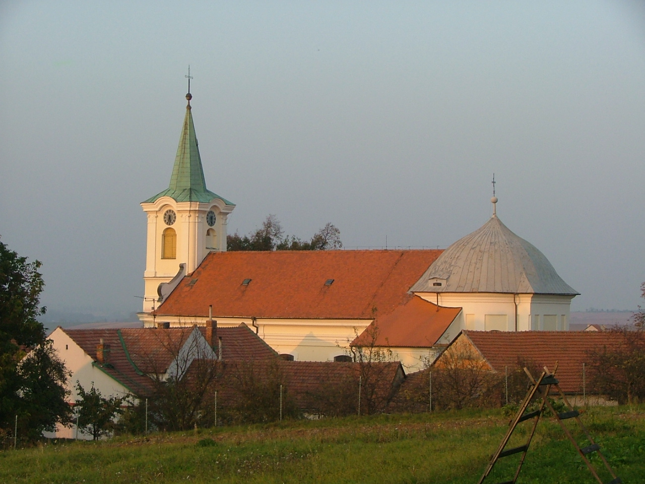 Kostel sv. Jiří (Moravské Prusy), Moravské Prusy